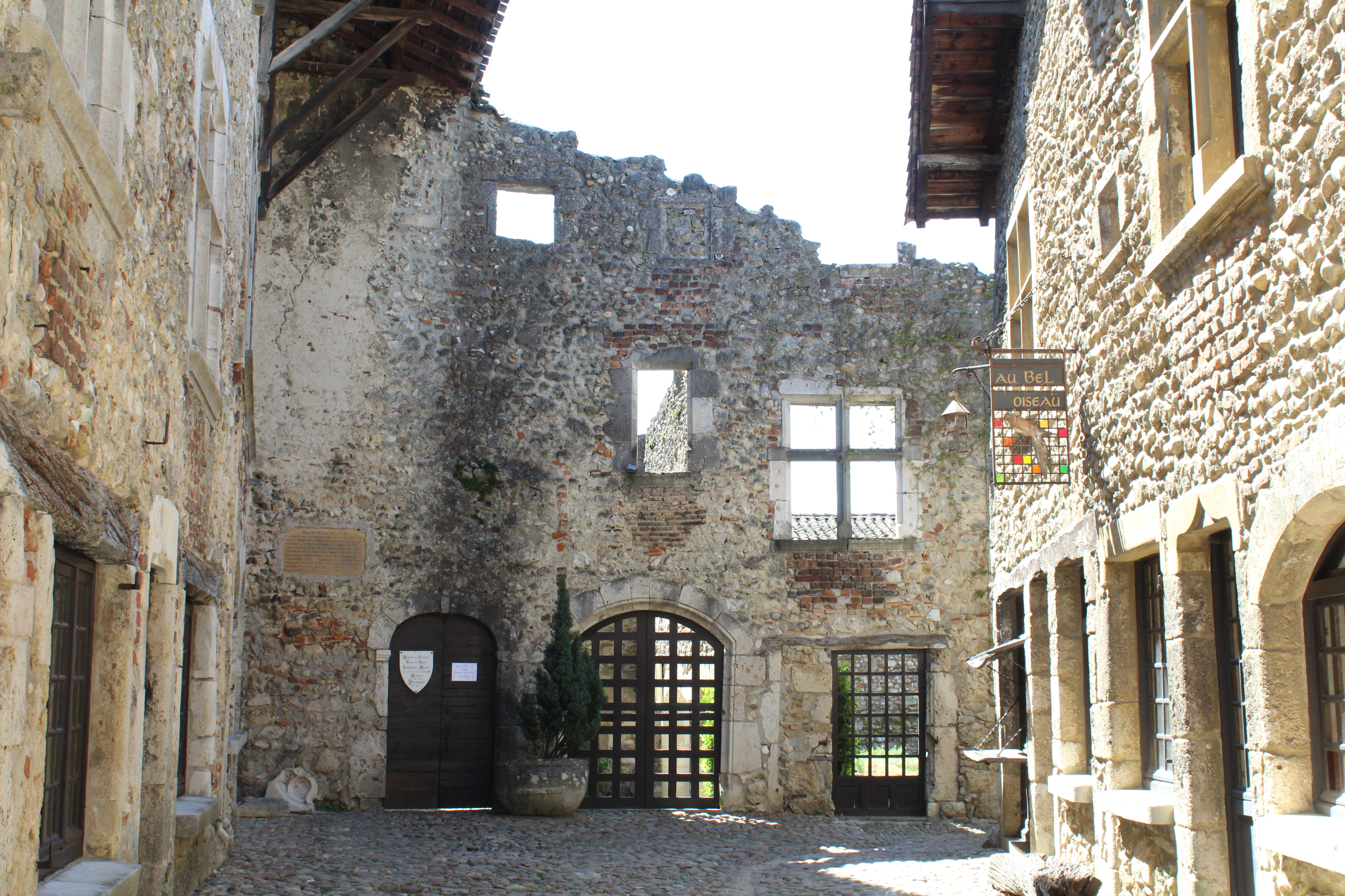 Immeuble (rue du Prince) : à droite Maison du Prince : à gauche Pérouges